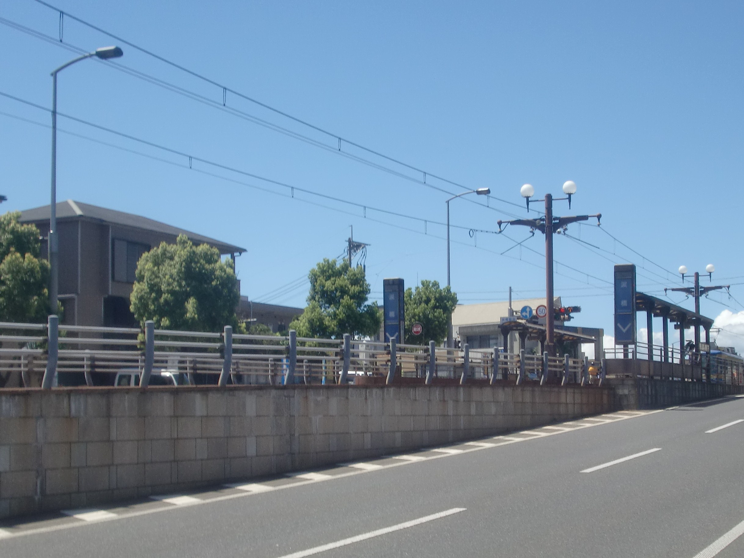 涙橋駅の外観